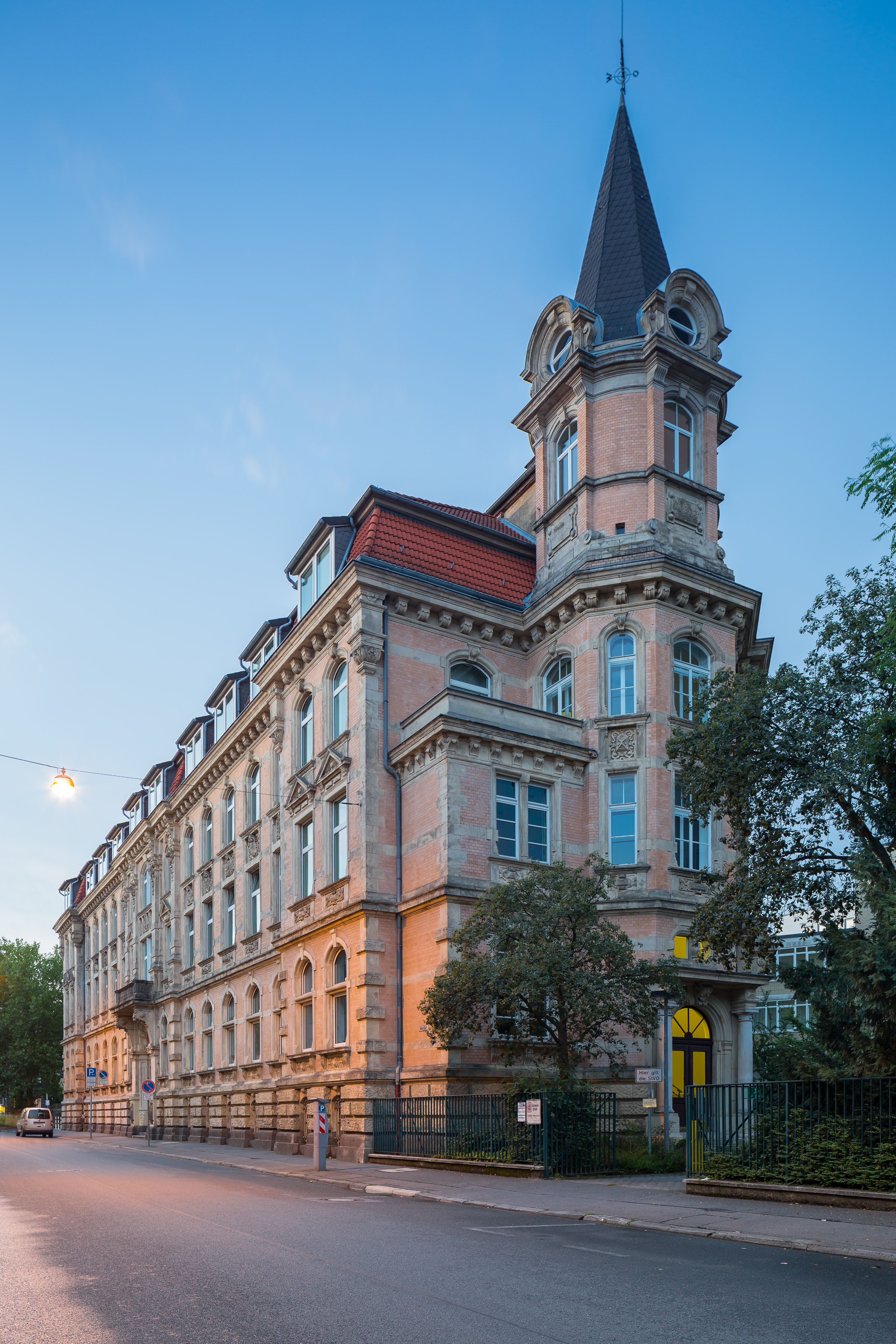 Ehemaliges Gebäude der "Alters- und Invaliditäts-Versicherungsanstalt" an der Maschstraße 25 in Hannover. Hinweis: Das Bild wurde mit einem Objektiv vom Typ Canon TS-E 24mm f/3.5 L II aufgenommen und nicht - wie in den EXIF-Metadaten vermerkt - mit einem TS-E 17mm f/4.0 L.